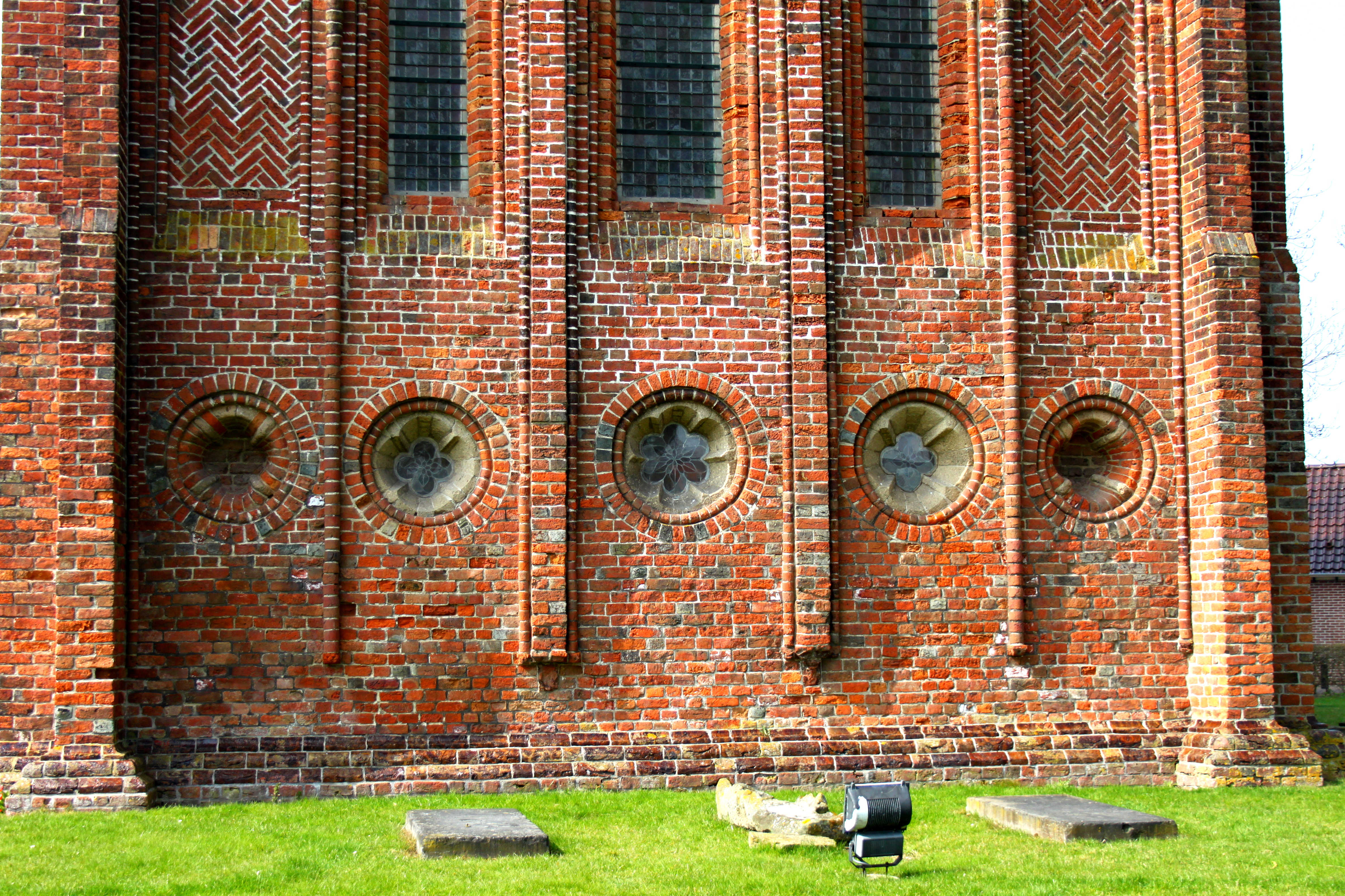 Termunten, Petrus Muntinghepad 4 - Ursuskerk -2015